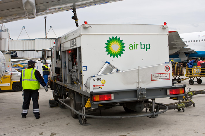 Flugzeug-Betankung am Flughafen Wien-Schwechat